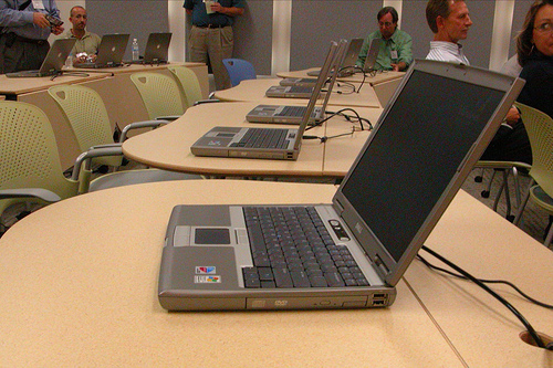 Un espace de formation sur ordinateurs